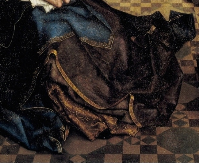 Detail: Rogier van der Weyden: Der hl. Lukas zeichnet die Madonna, 137x110cm, um 1440, Boston ,USA